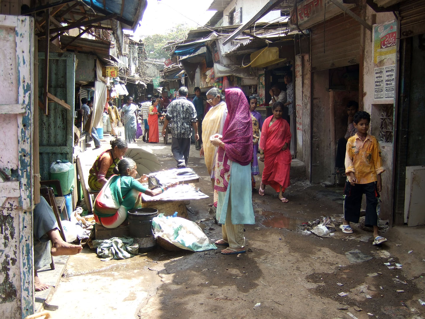 Dharavi Slum in Mumbai, India